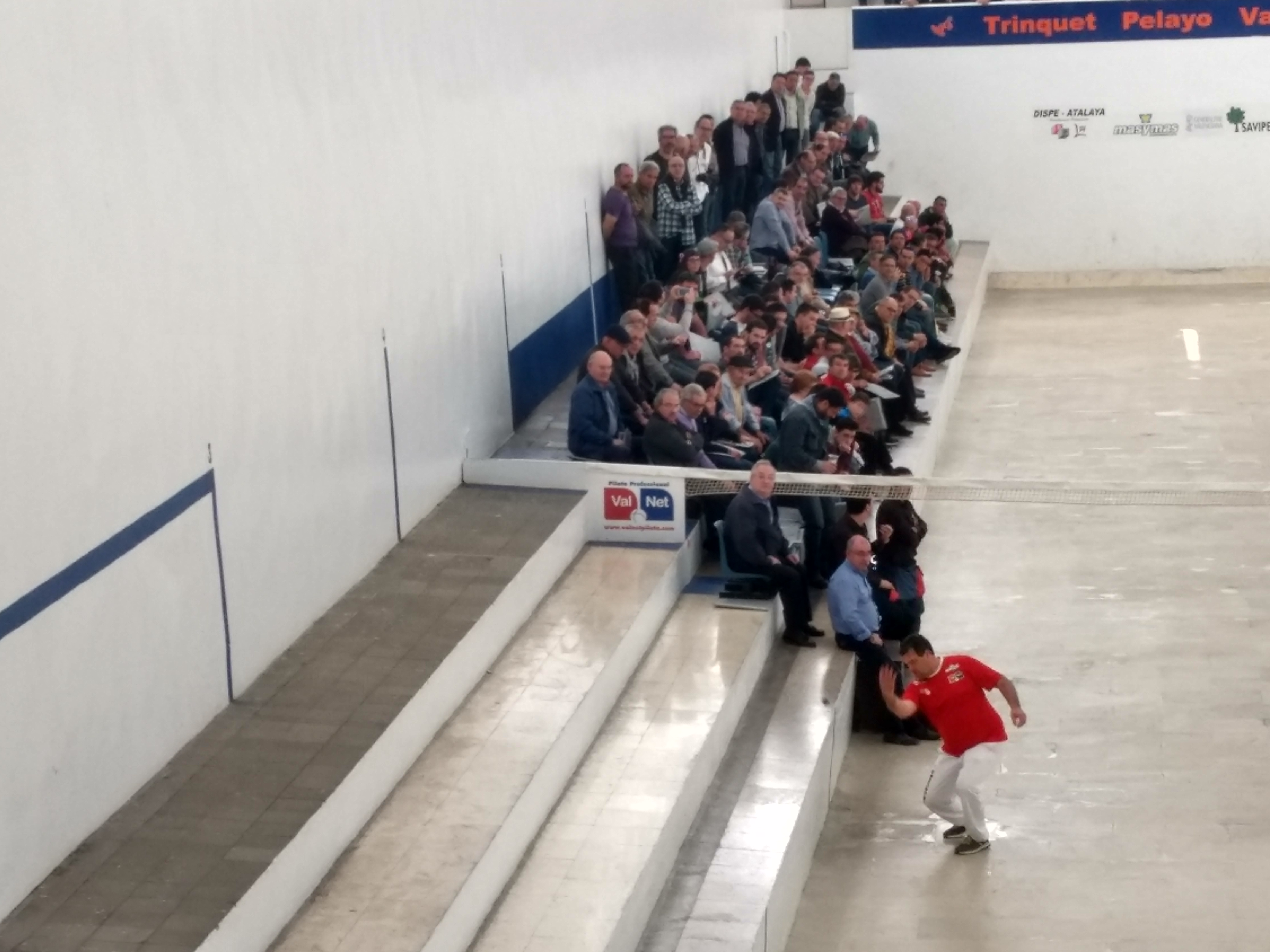 Partida de pilota. Final del torneig de Falles del trinquet de Pelayo. Ximo Oltra, feridor de l'equip roig, fa la ferida des de la pedra. This is a photography of a Folklore festival in Spain (Wikidata id Q1143768).